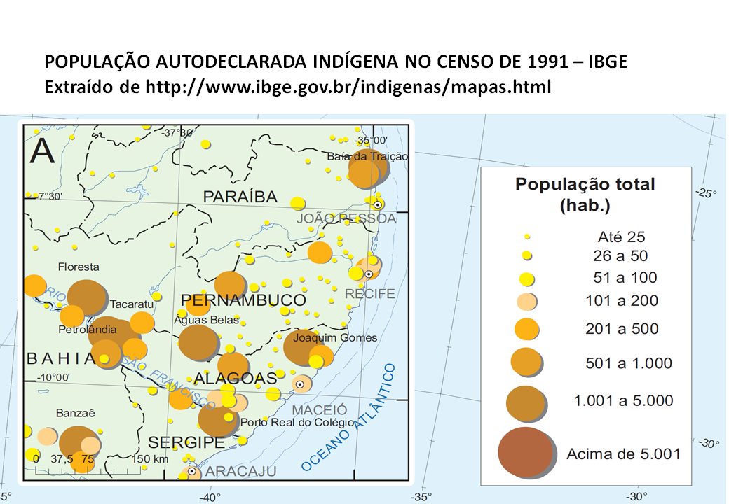 População Autodeclarada Indígena em 2000